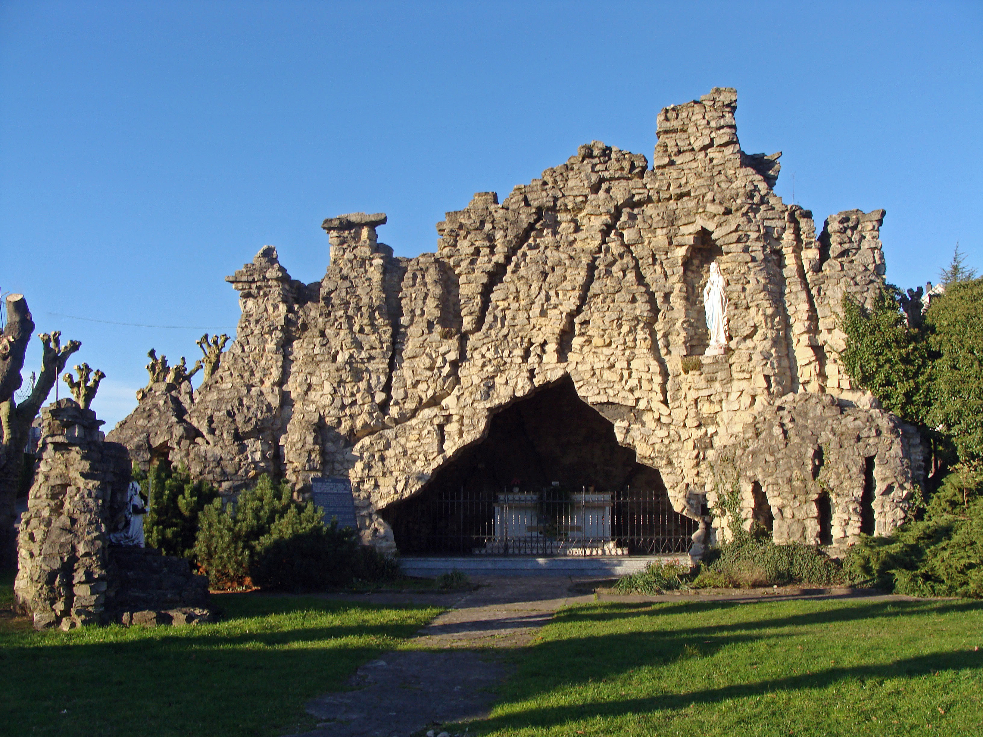 Grotte de Lourdes de L'Hôpital (Moselle), rue de Saint-Avold